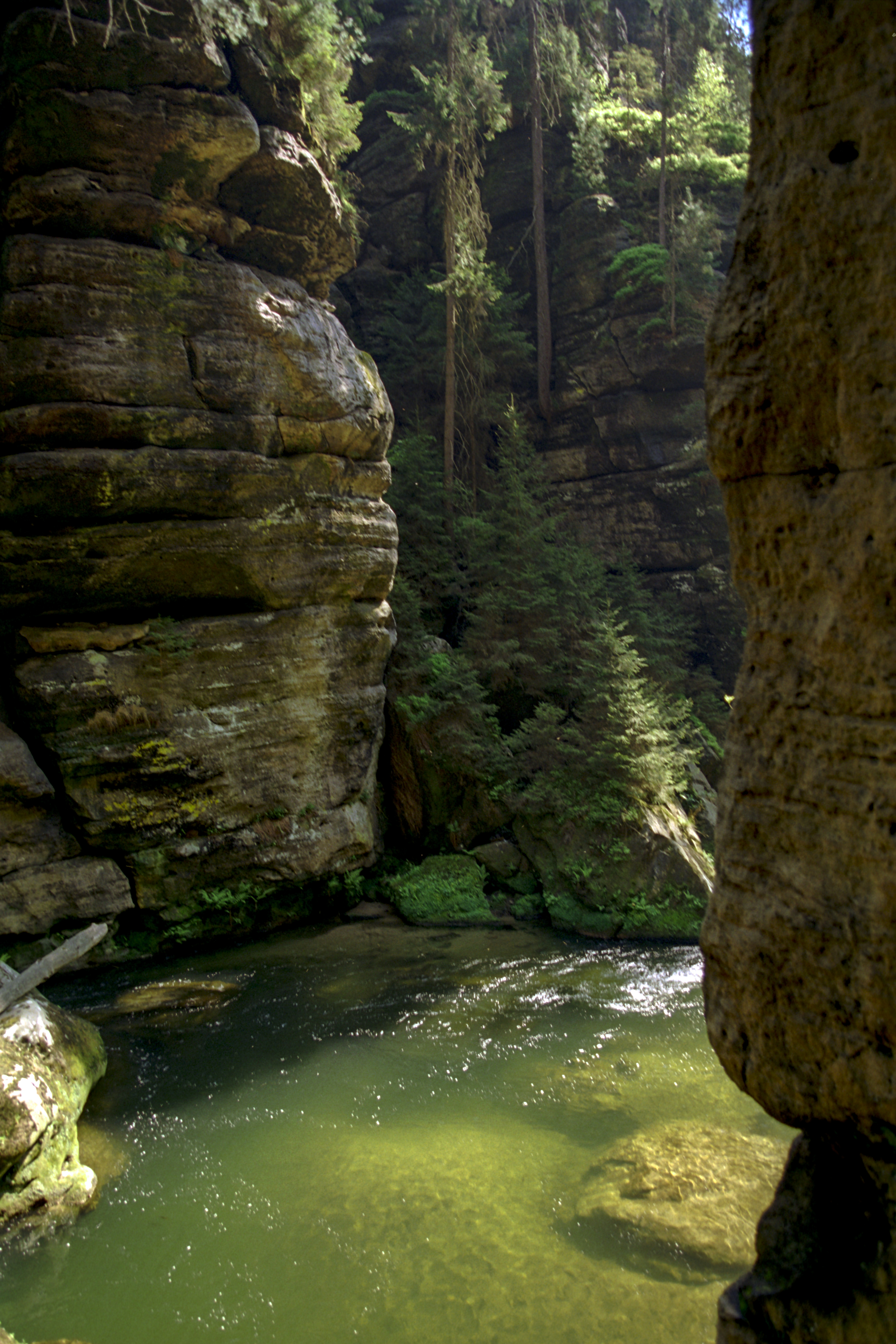 Kamenica River